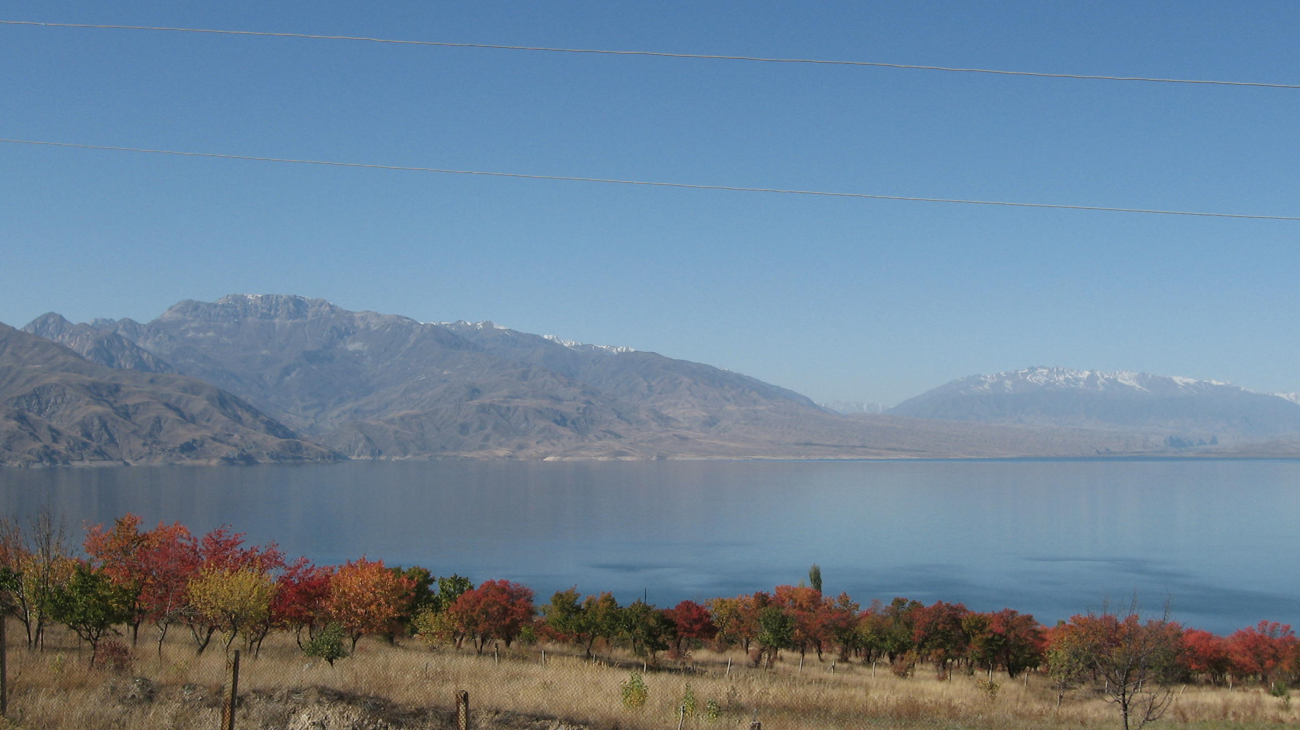 Toktogul Reservoir, Kyrgyzstan